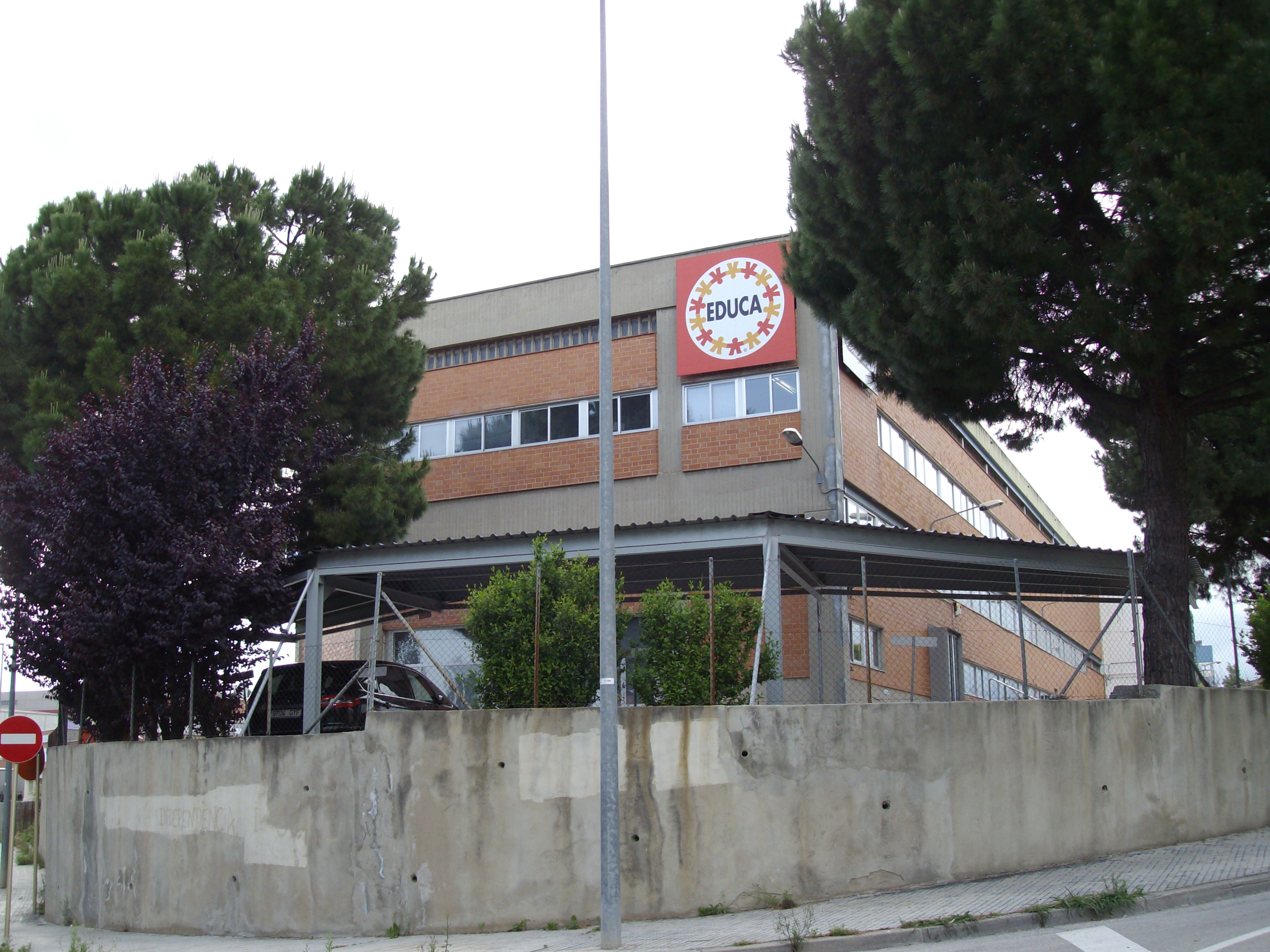 Fábrica de juguetes Educa Borras. Sant Quirze del Vallès, Barcelona (España).